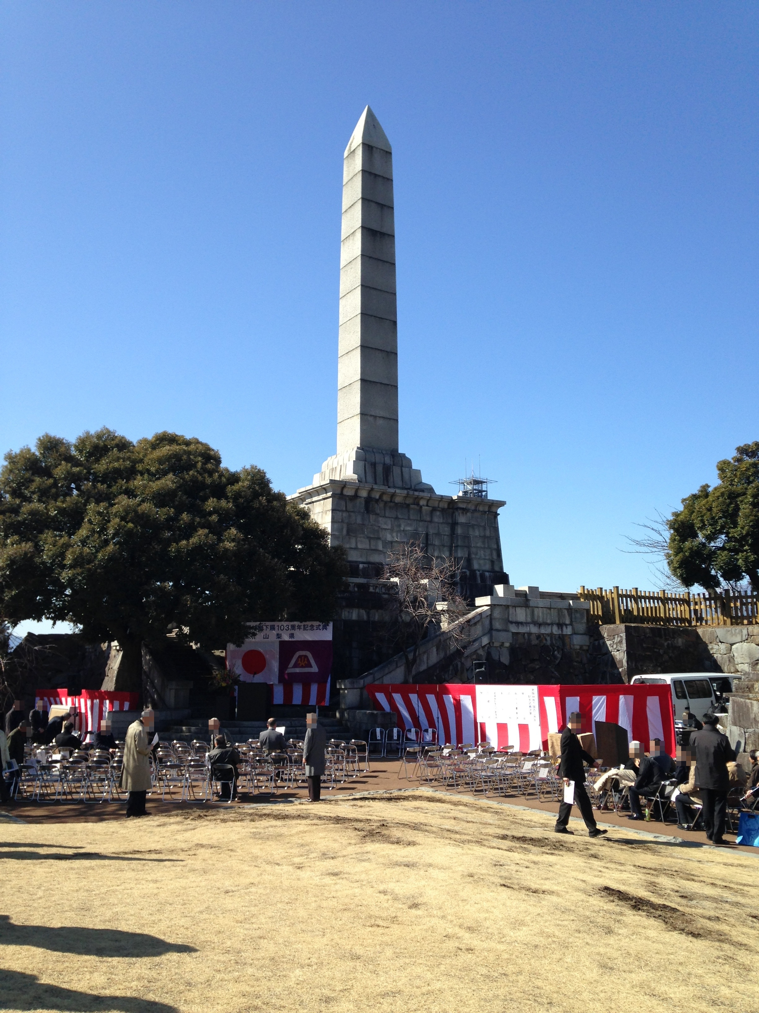 甲府城跡にある謝恩塔